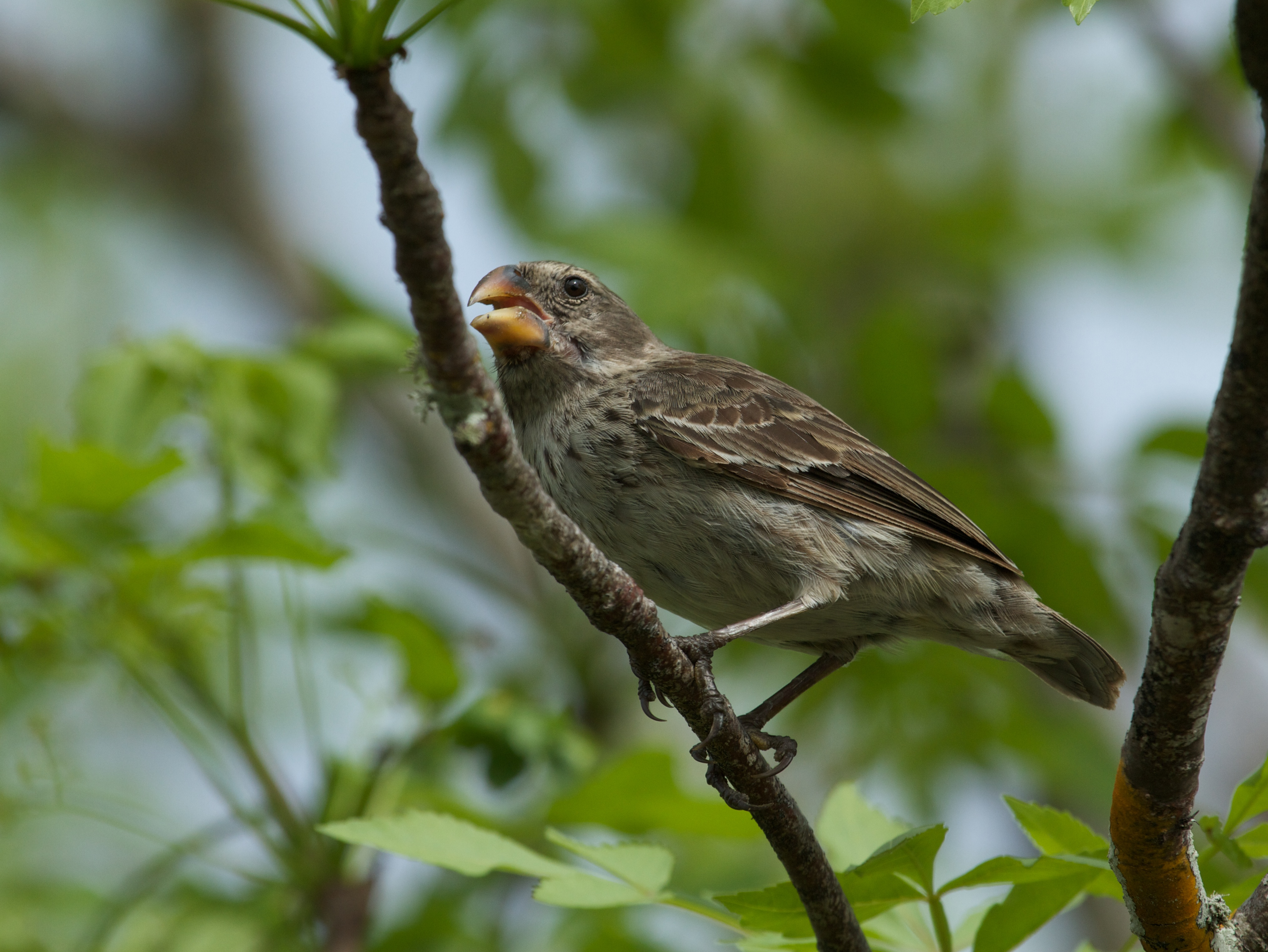 Platyspiza crassirostris